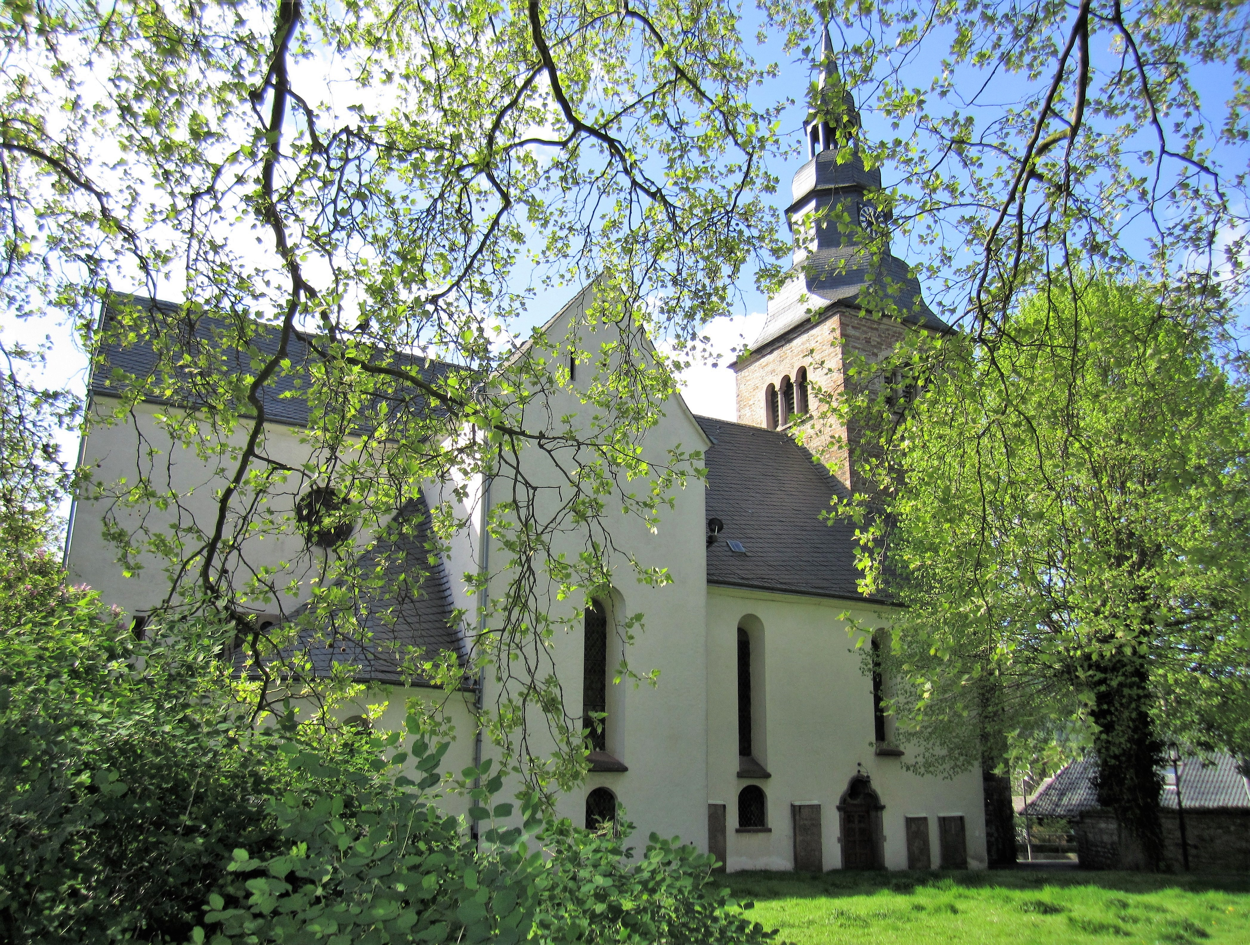 Denkmalgeschützte ev.-luth. Pfarrkirche Elsey im Hagener Stadtteil Hohenlimburg. Die ehemalige Stiftskirche (siehe auch: Kloster Elsey) zählt zu den frühesten Sakralbauten im Raum Hagen und ist in ihrer ursprünglichen Baugestalt weitgehend erhalten geblieben. Erbaut und gestiftet um 1223 von der Isenburger Gräfin Mathilde. Erste urkundliche Erwähnung war 1259. Die Kirche war aber sicher schon früher Mittelpunkt des 1220 gegründeten Klosters, sowie des religiösen Lebens unterhalb der gräflichen Burg. Die dreischiffige und zweijochige spätromanische Hallenkirche zeigt noch heute ihre mittelalterliche Herkunft. Zahlreiche Um- und Einbauten im Innenraum wurden 1881/82 im neugotischen Stil durchgeführt. Die Kirche war Grablege von Angehörigen des Grafenhauses. Bemerkenswert ist das Epitaph für Graf Konrad Gumprecht im Chor und ein Zweites im Turmraum. Im Kirchhof befinden sich mehrere Grüfte adeliger Stiftsdamen. Grabdenkmale für den Stiftsprediger Johann Friedrich Möller, seines Nachfolgers Dr. Wilhelm Hülsemann u.a. befinden sich an der Kirche. This is a photograph of an architectural monument.